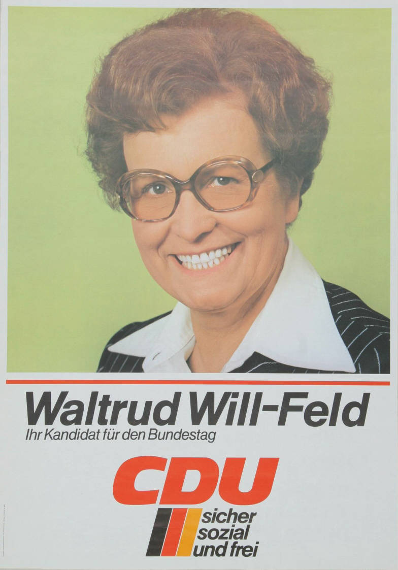 Waltrud Will-Feld Ihr Kandidat für den Bundestag CDU sicher sozial und freiAbbildung:PorträtfotoPlakatart:Kandidaten-/Personenplakat mit PorträtAuftraggeber:CDU-Bundesgeschäftsstelle, Abt. Öffentlichkeitsarbeit, BonnObjekt-Signatur:10-001: 1829Bestand:Plakate zu Bundestagswahlen (10-001)GliederungBestand10-18:Plakate zu Bundestagswahlen (10-001) » Die 8. Bundestagswahl am 3. Oktober 1976 » CDU » Mit PorträtfotoLizenz:KAS/ACDP 10-001: 1829 CC-BY-SA 3.0 DE